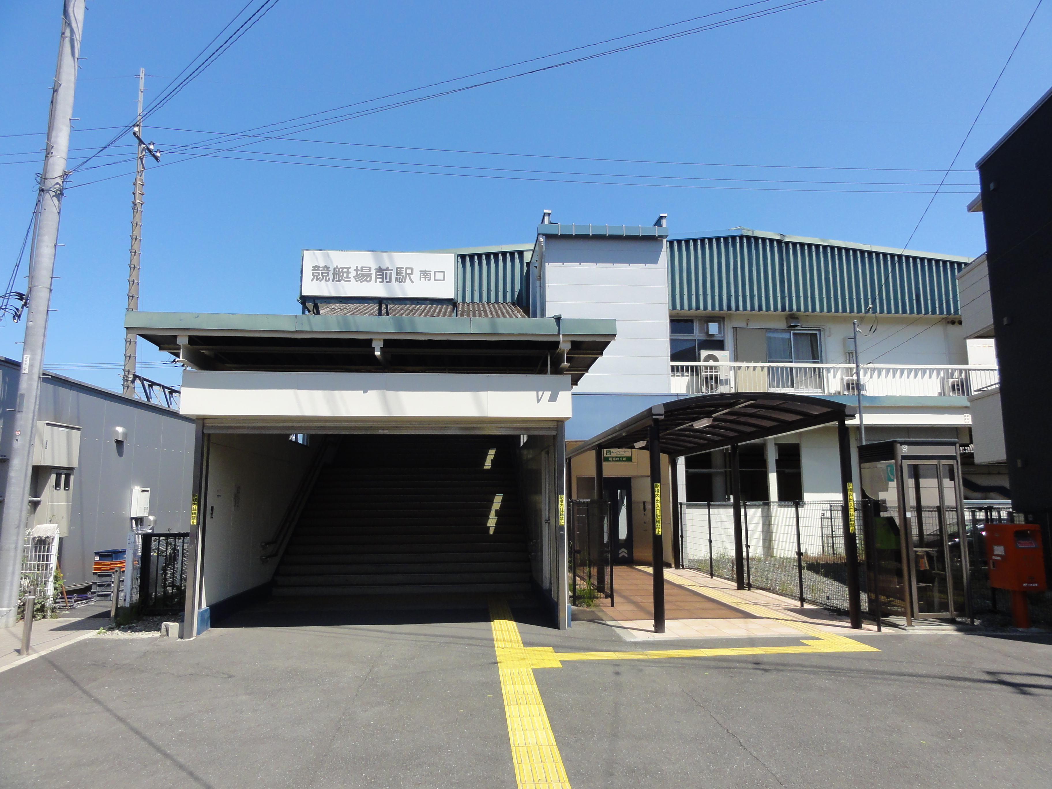 競艇場前駅